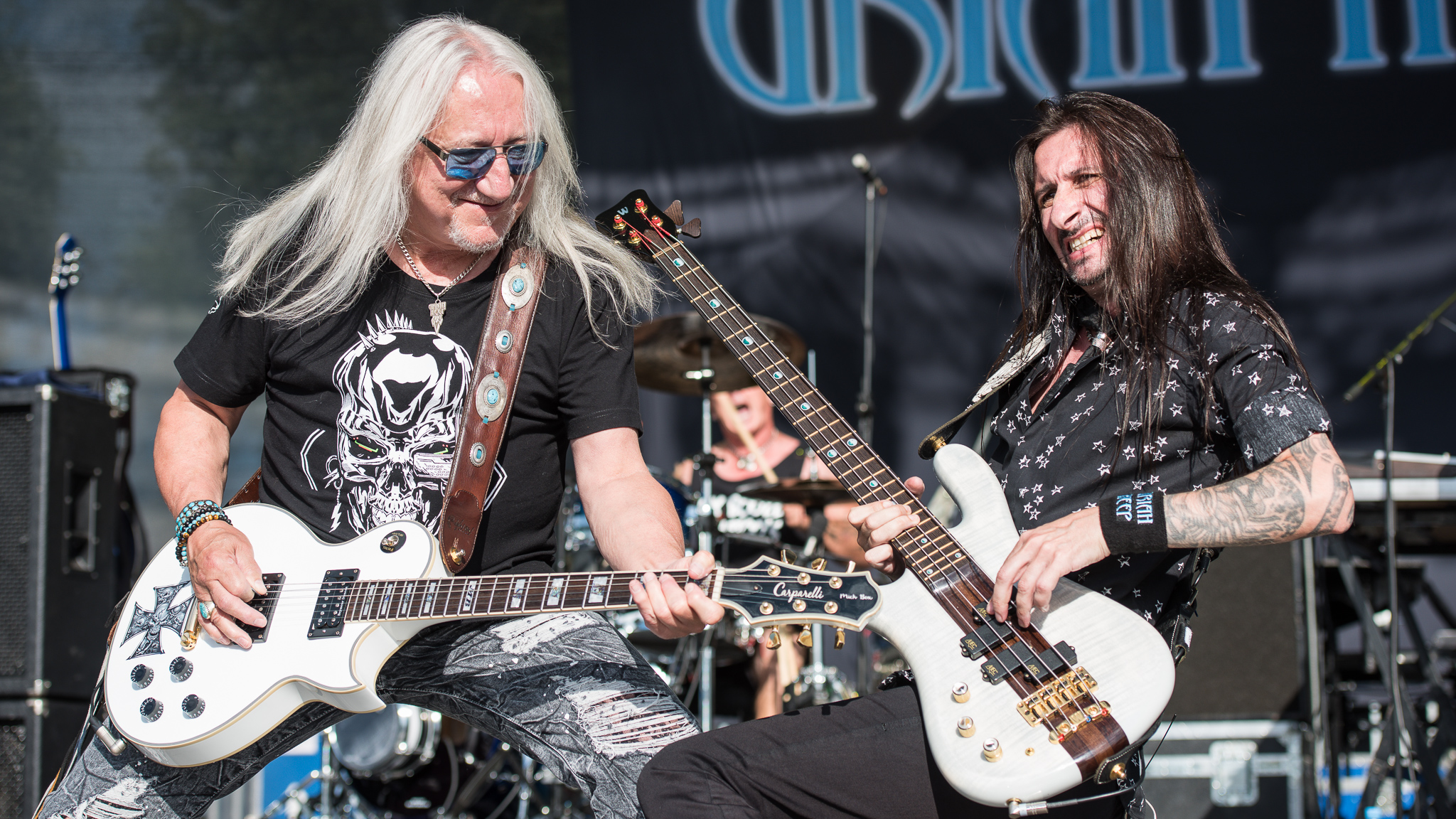 Brombachsee,Concertbüro Franken,Davey Rimmer,Festival,Konzert,Lieder am See,Livekonzert,Livemusik,Mick Box,Musik,Uriah Heep